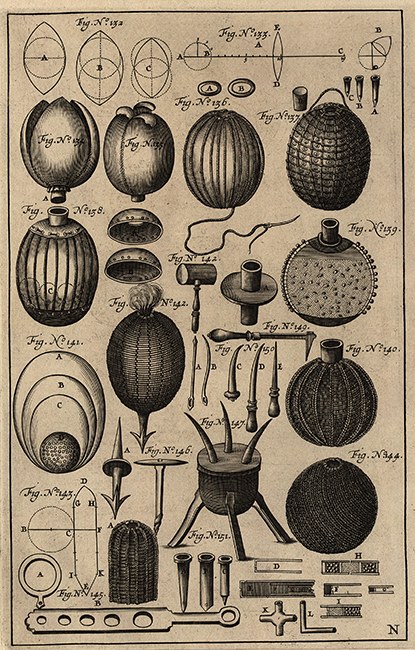 Geräte zu Herstellung von Brandballen